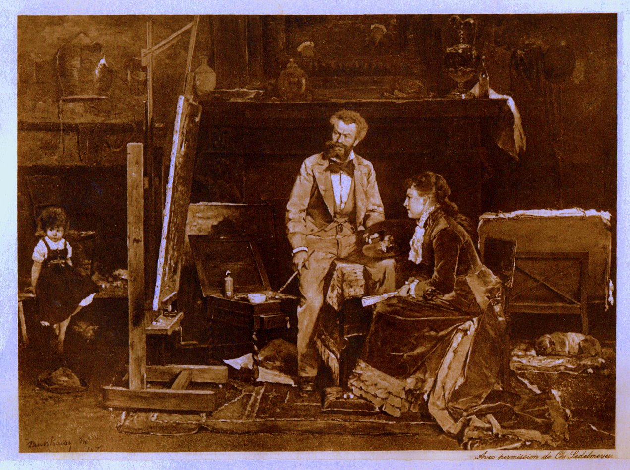 Munkácsy Mihály: Műteremben = In studio